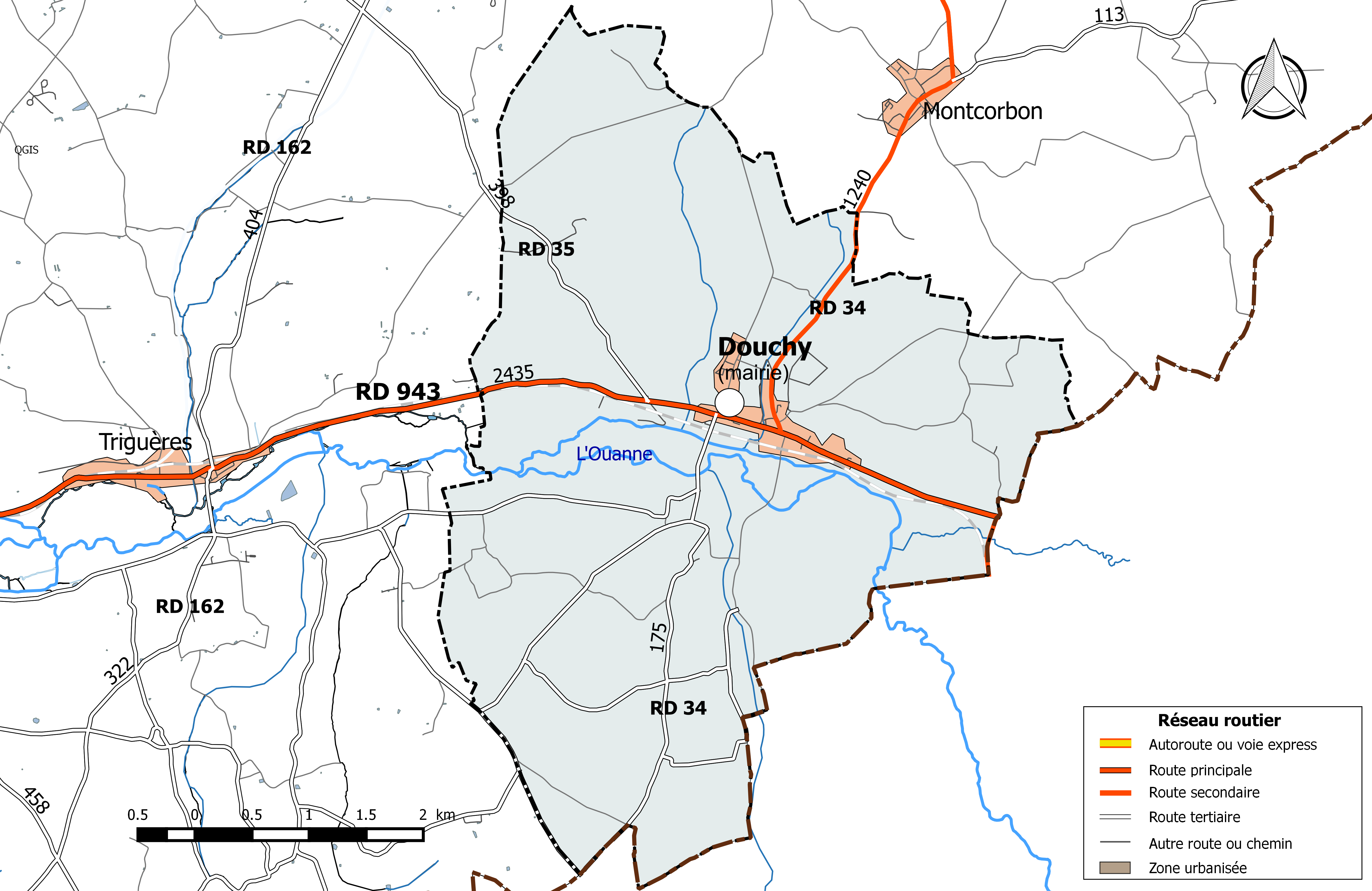 Carte du réseau routier de la commune de Douchy (Loiret).